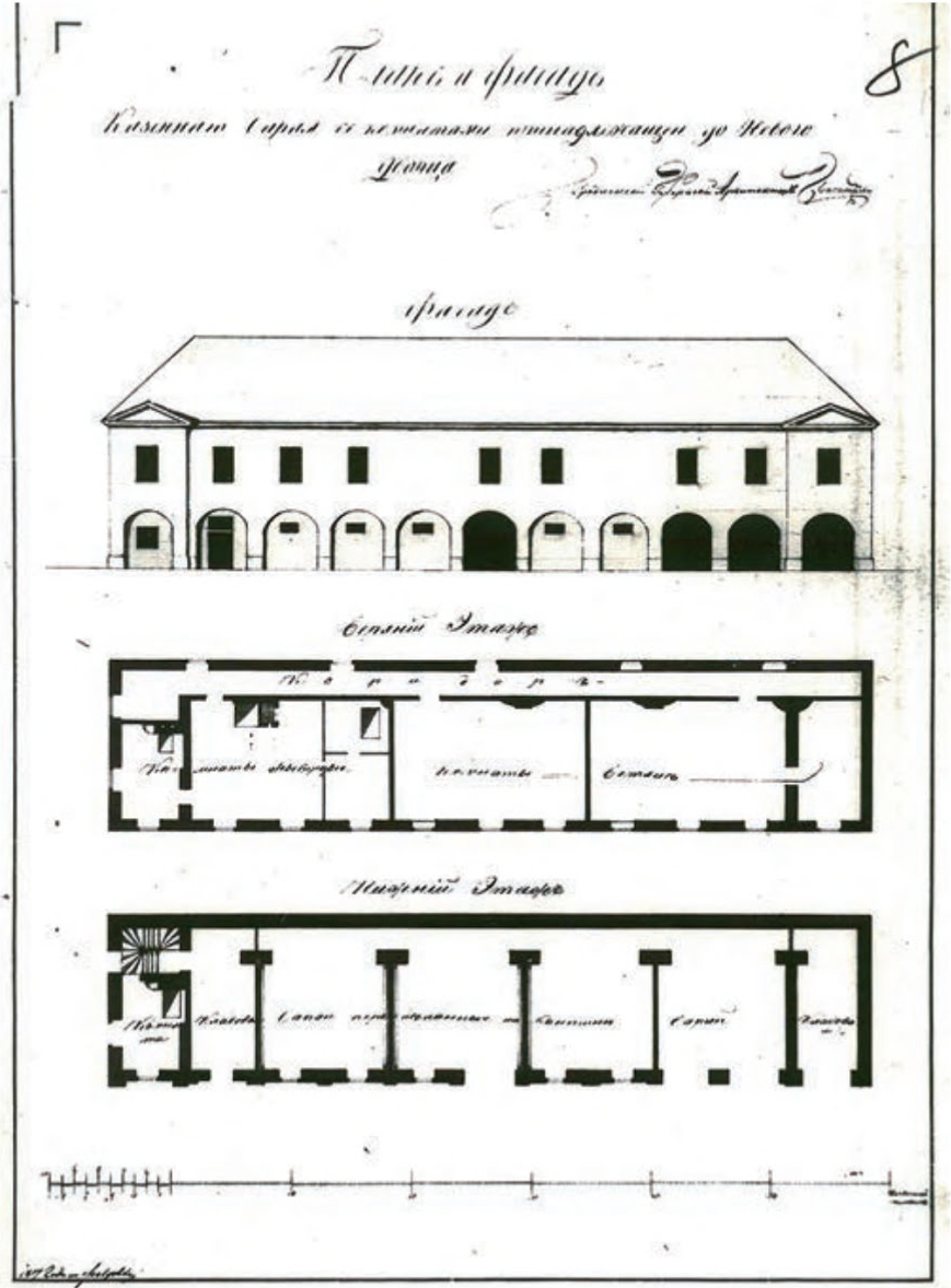 Беларуская (тарашкевіца): Горадня (Horadnia), стайні пры Новым замку (Novy zamak)